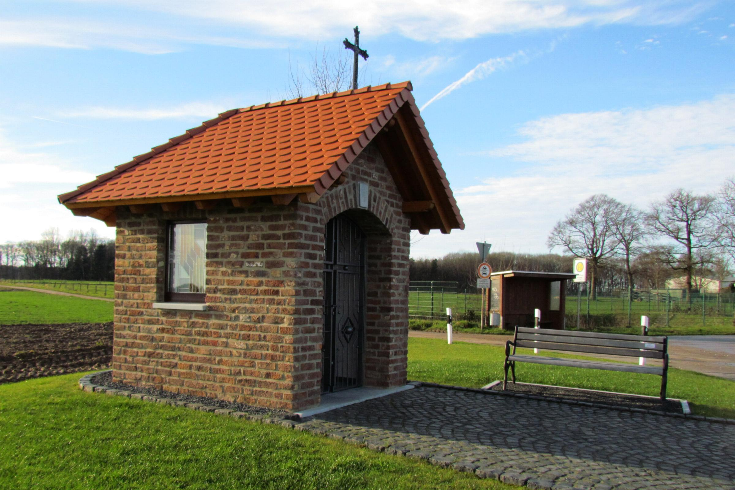 Herz Jesu Kapelle in Hoven